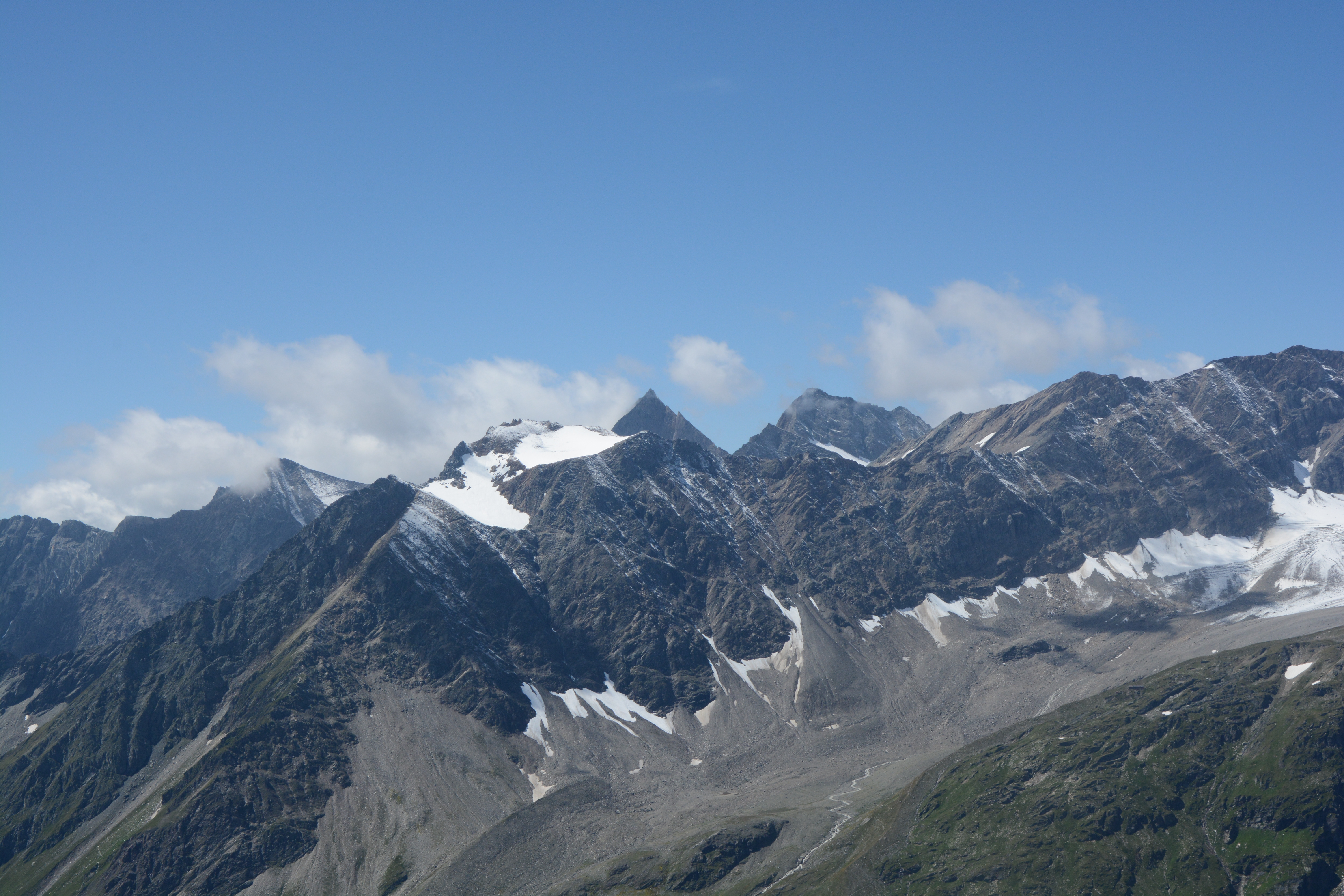 Hohe Achsel mit Seeköpfen gesehen vom Aufstieg zum Wildenkogel.